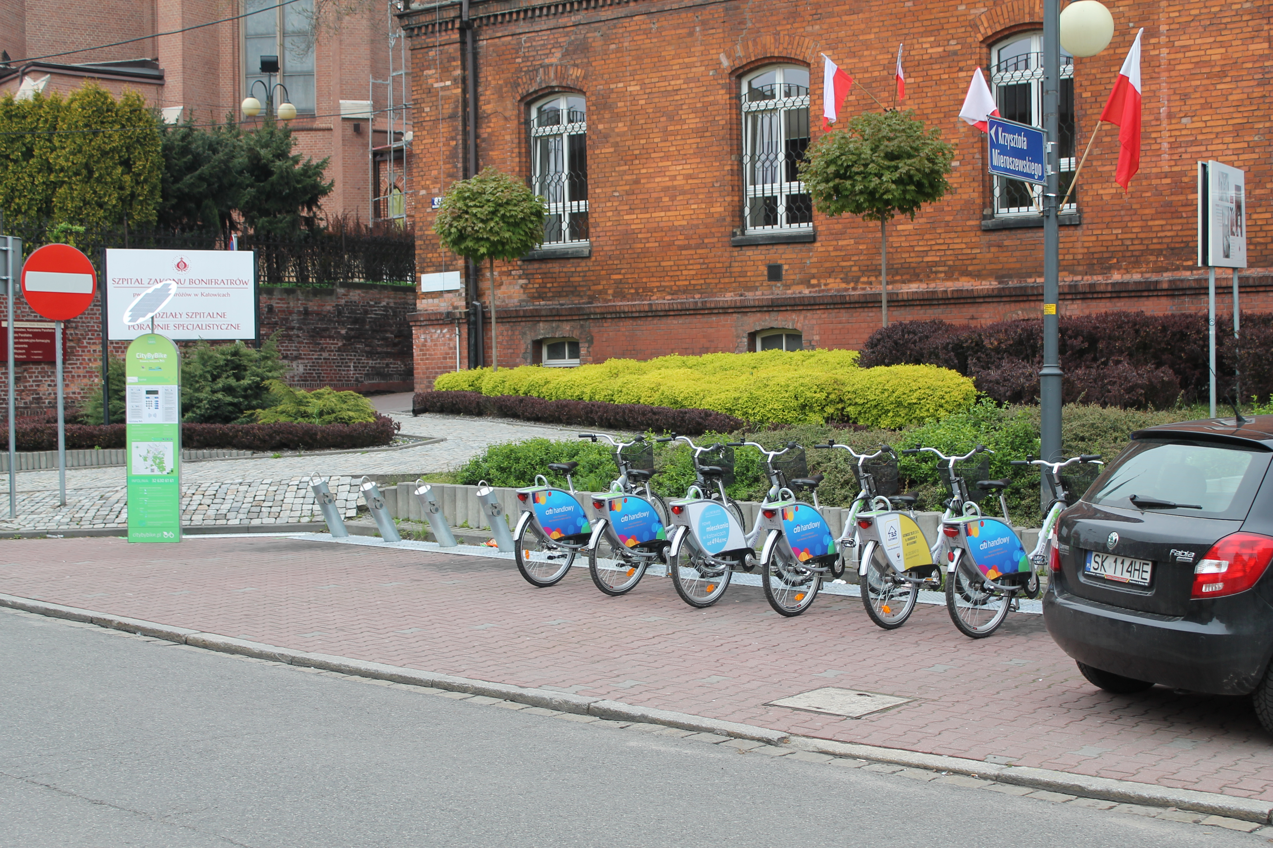 Stacja City by bike "Bogucice Szpital"